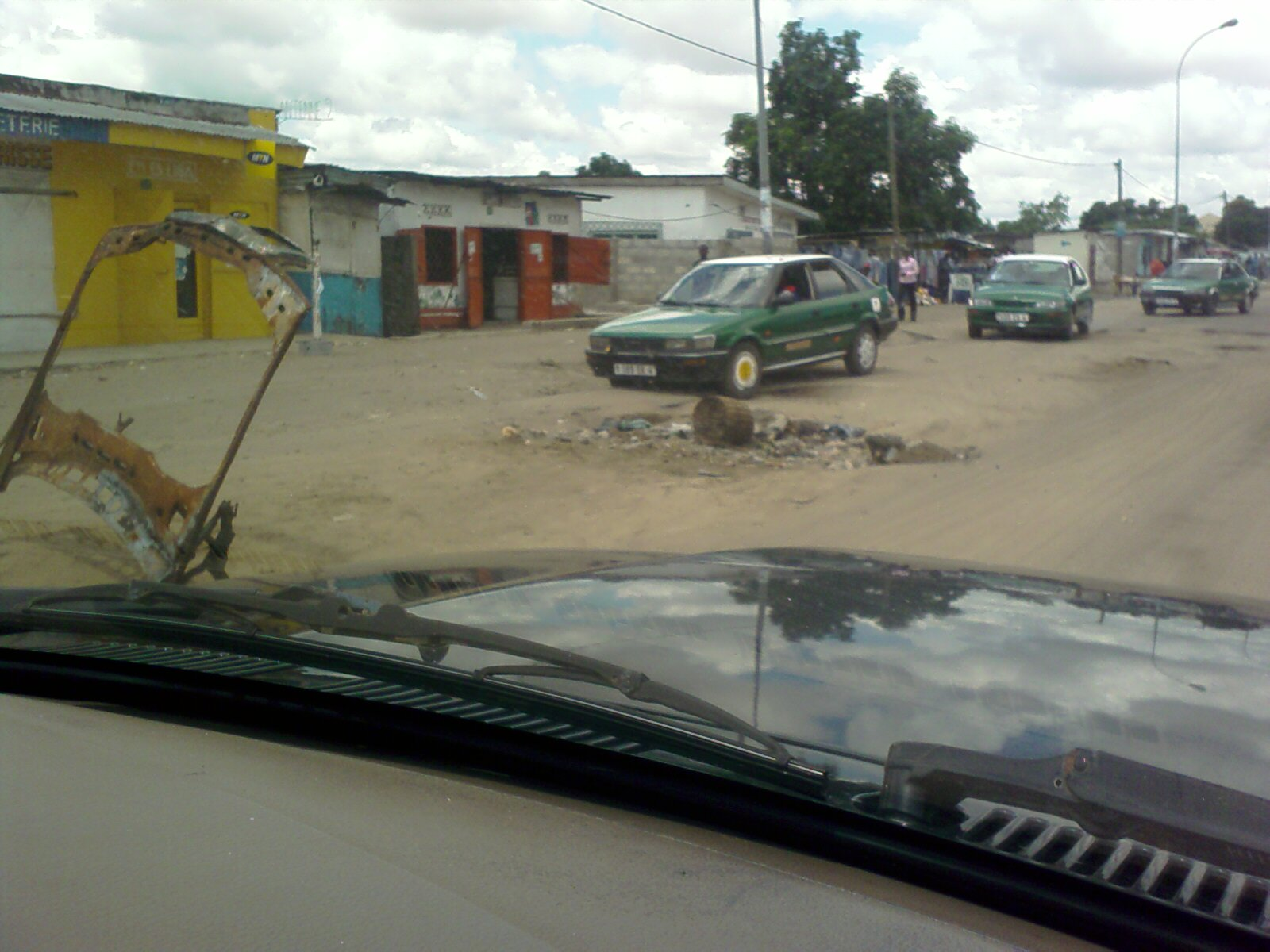 Taxis de Brazzaville, République du Congo. (Toyota Corola)